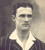 Marcos Mendonça - jogador 1914